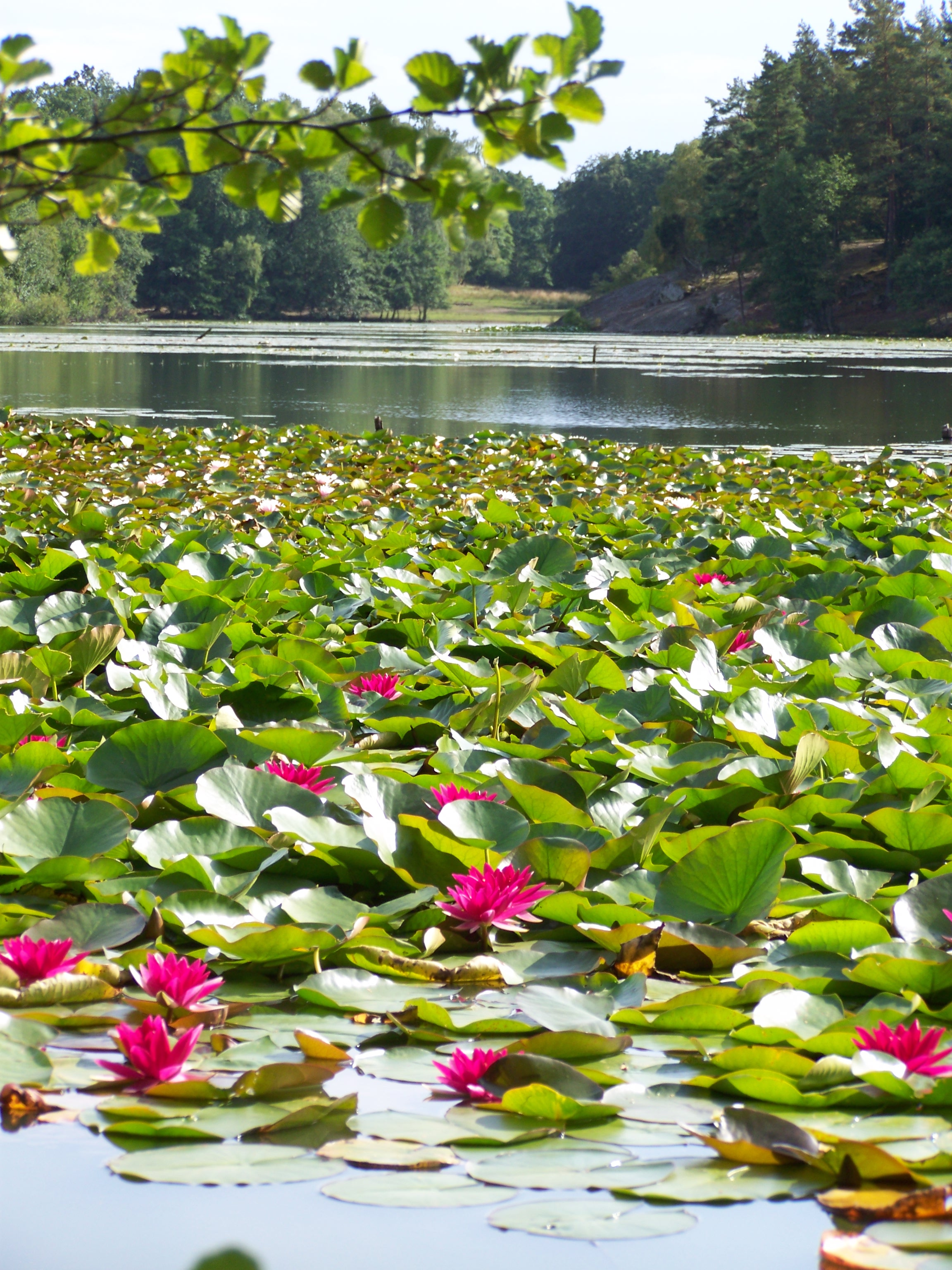 In Schweden. Eriksberg, Blekinge